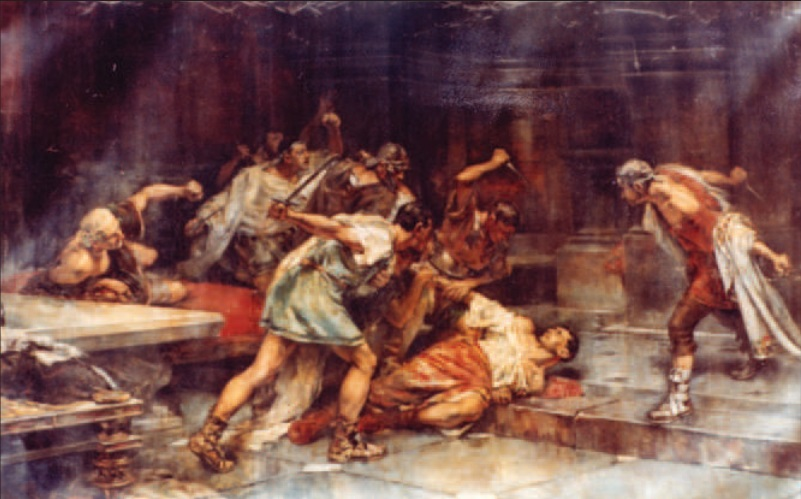 Vicente Cutanda La muerte de Sertorio